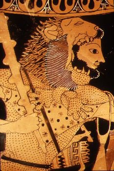 赫拉克勒斯身着狮皮的形象；古希腊陶绘，约公元前四世纪。来自